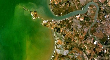 Île Madame, vue satellite (NASA).